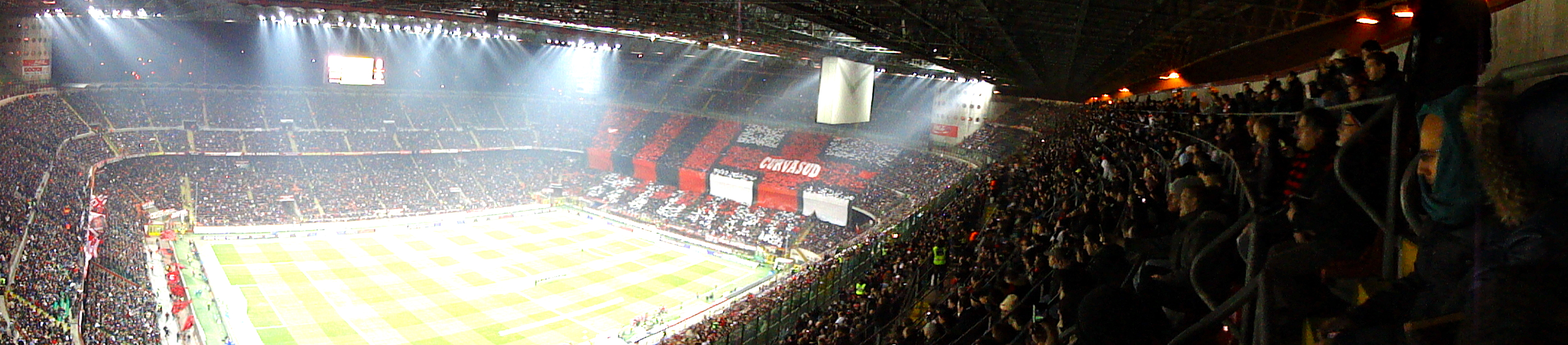 Panorama mit Choreographie